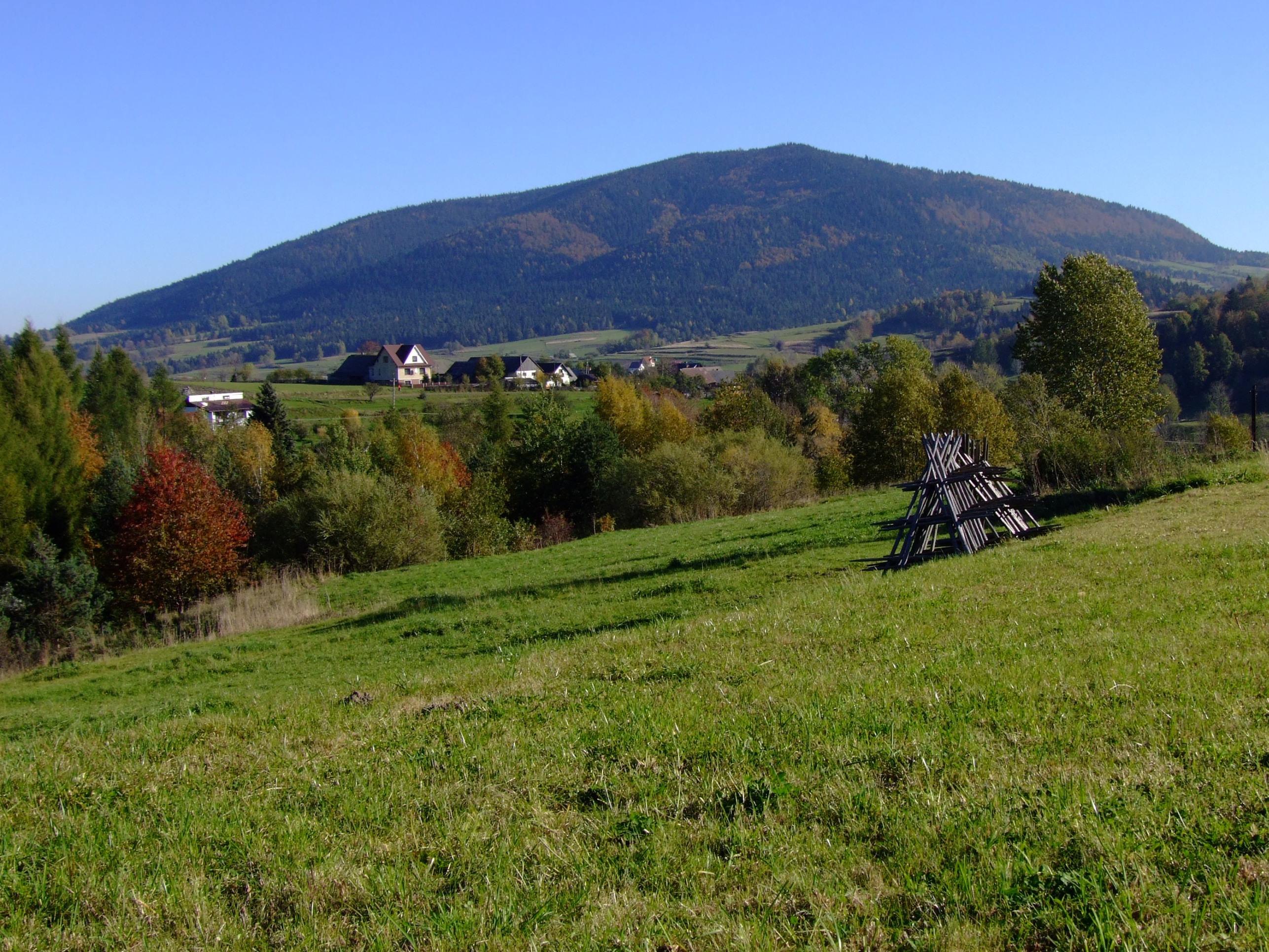 Łopień (Beskid Wyspowy). Widok od południowej strony